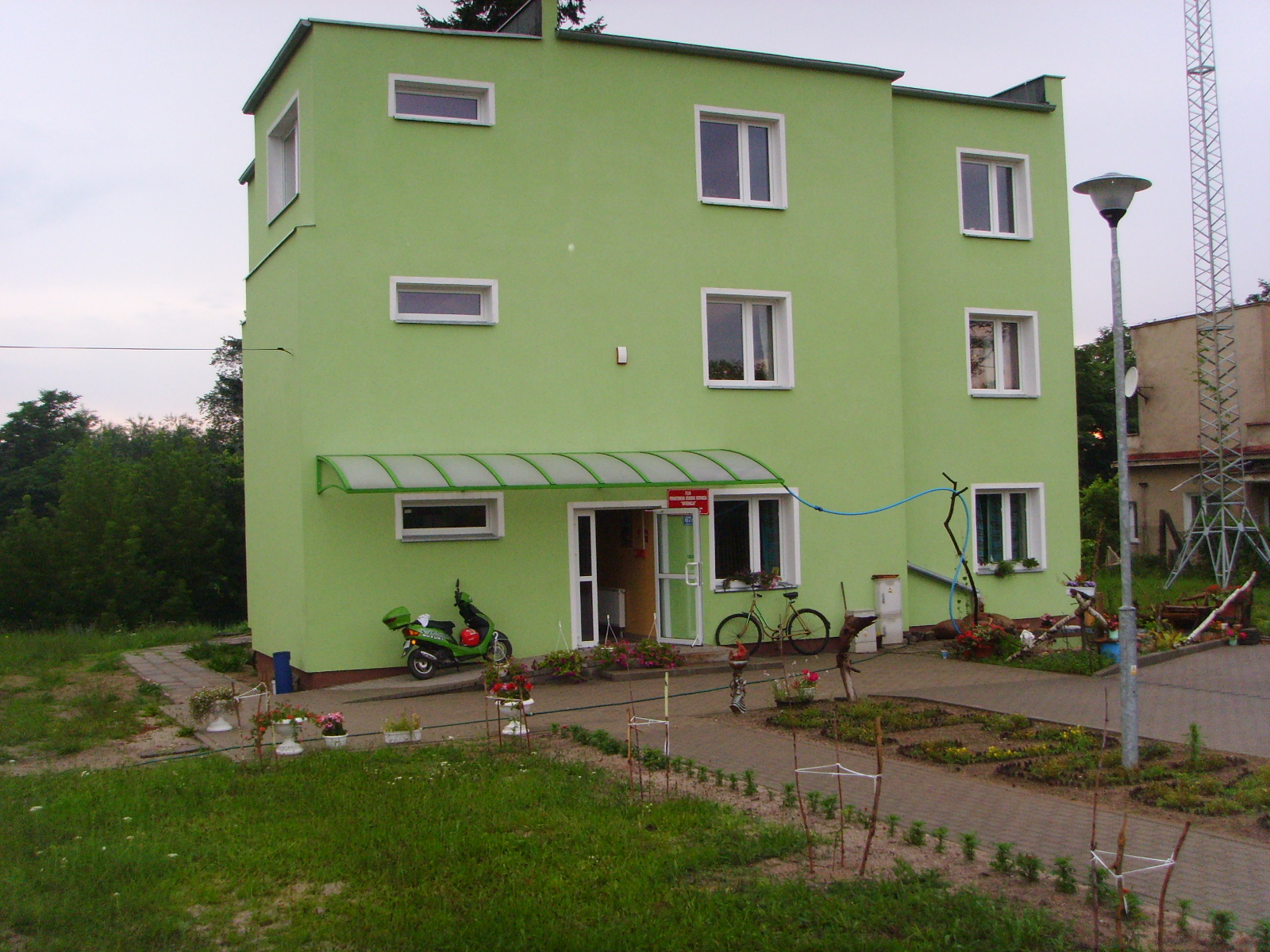 Była strażnica WOP w Gubinie